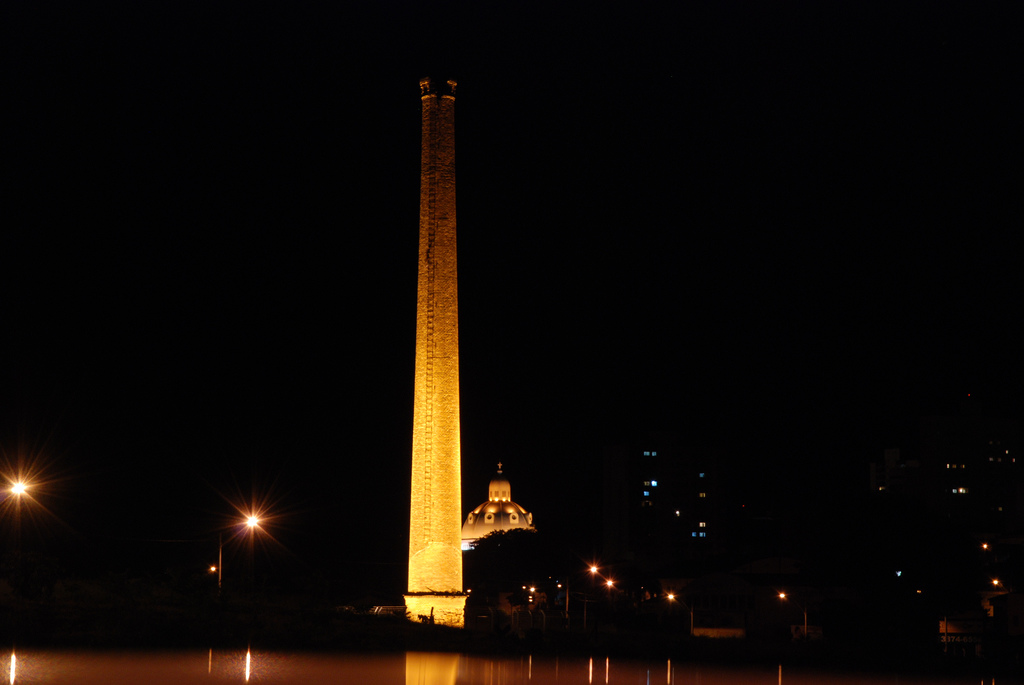 Uma bela imagem do chaminé e da catedral. O teto do carro serviu para conseguir o efeito "água" no rodapé da foto.